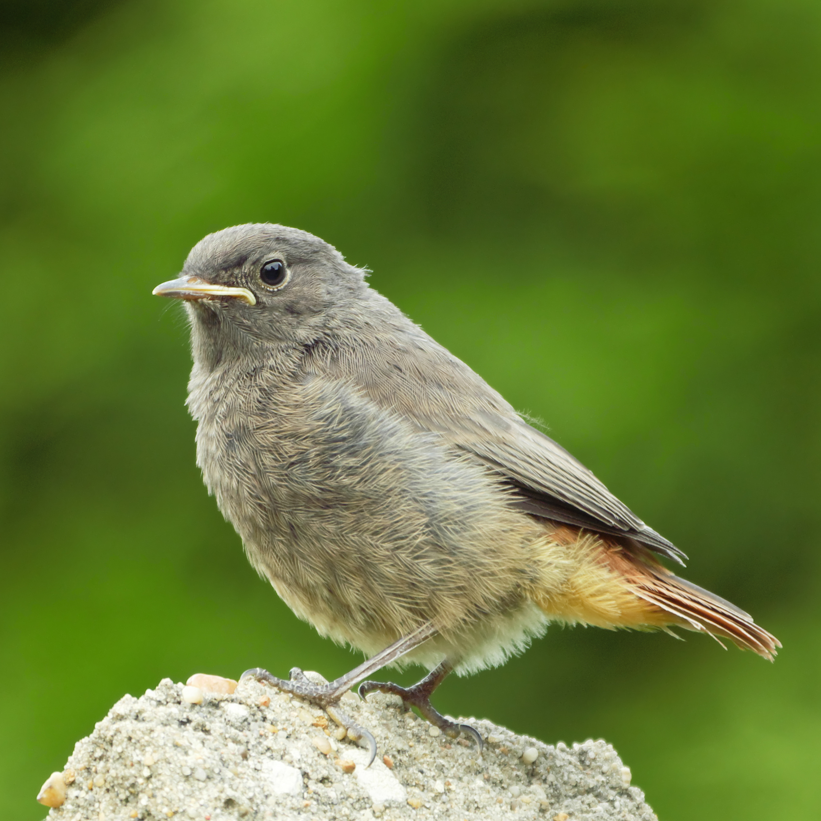 Hausrotschwanz, Jungvogel, Anfang Juni, Berlin